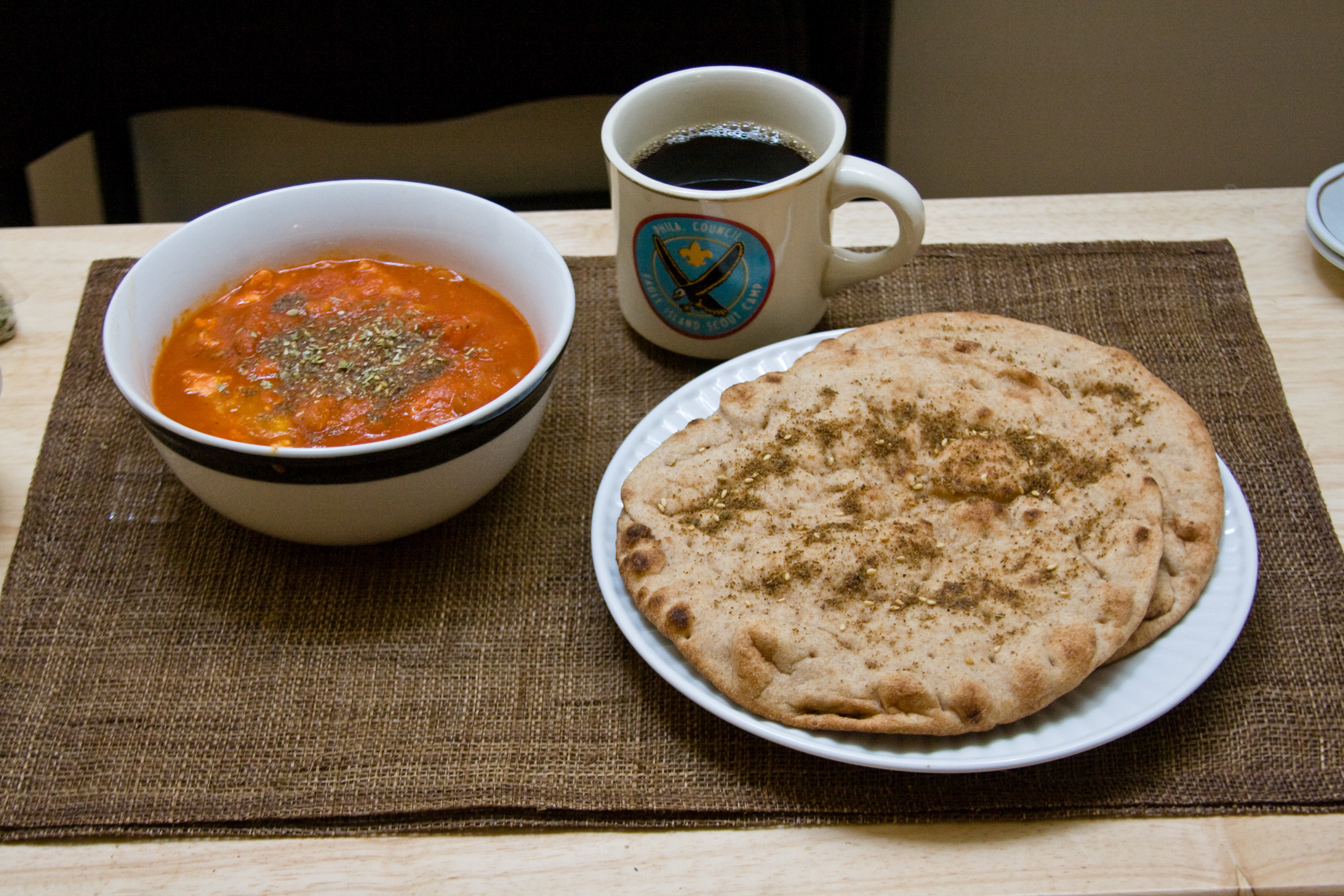 Shakshuka and Pita with Zatar